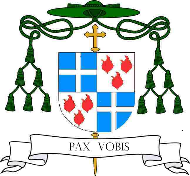 Wappen Friedrich Wetter, Bischof von Speyer (1968-1982)